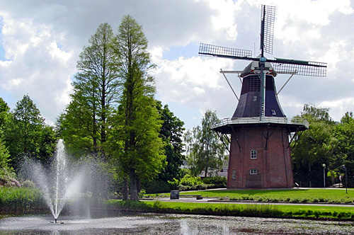 Korenmolen De Onrust